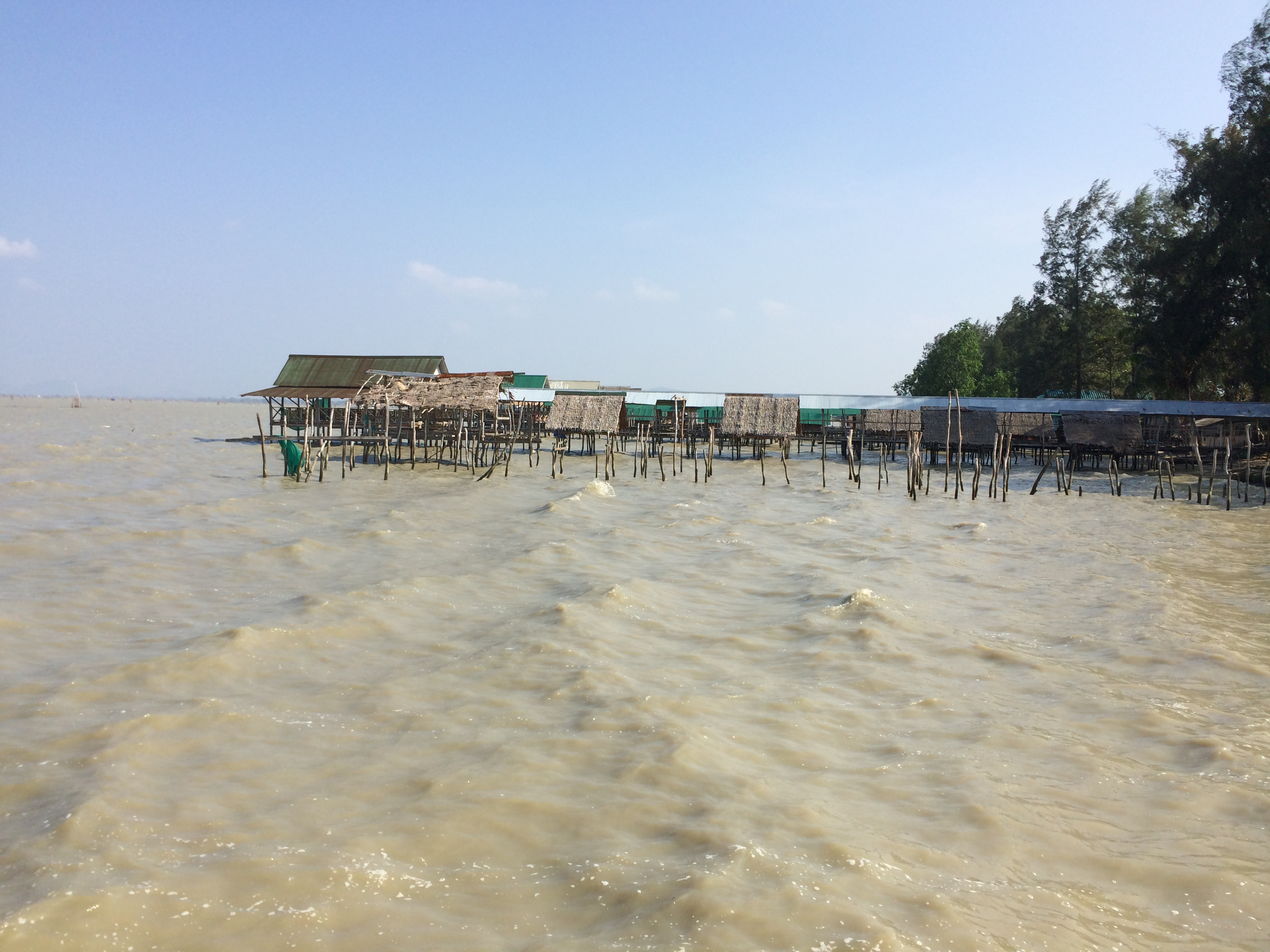 Khu Tao, Hat Yai District, Songkhla 90110, Thailand